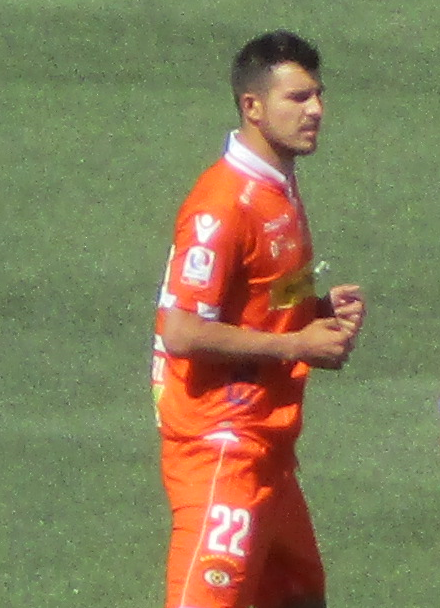 Josepablo Monreal en Cobreloa